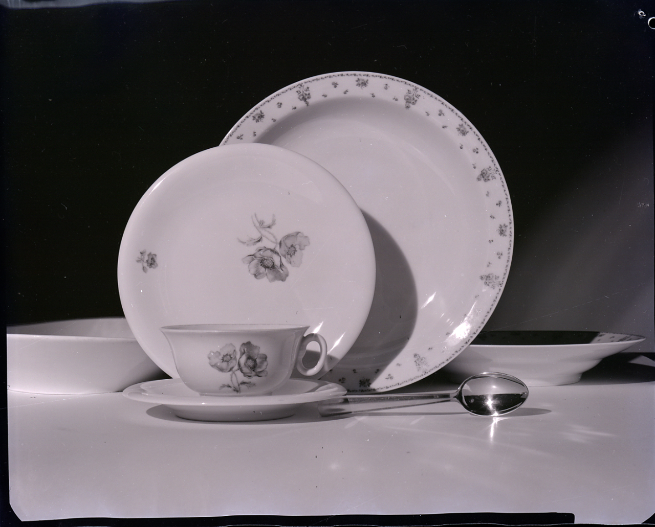 Servizio fotografico : Italia, 1963 / Paolo Monti. - Buste: 15, Fototipi: 15 : Negativo b/n, gelatina bromuro d'argento/ pellicola ; 10x12. - ((Serie costituita da 15 buste sciolte di negativi identificati con i nn.: 7249, 7250, 7251, 7252, 7253, 7254, 7255, 7256, 7257, 7258, 7259, 7260, 7261, 7262, 7263. - Alcuni negativi presentano segni di degrado (pellicola ondulata). - Fonte: Agenda di Paolo Monti: R 1 - Monti/ 1 aprile 1963 - 6 giugno 1964/ 6000-8193 (1963-1964), presso Archivio Paolo Monti